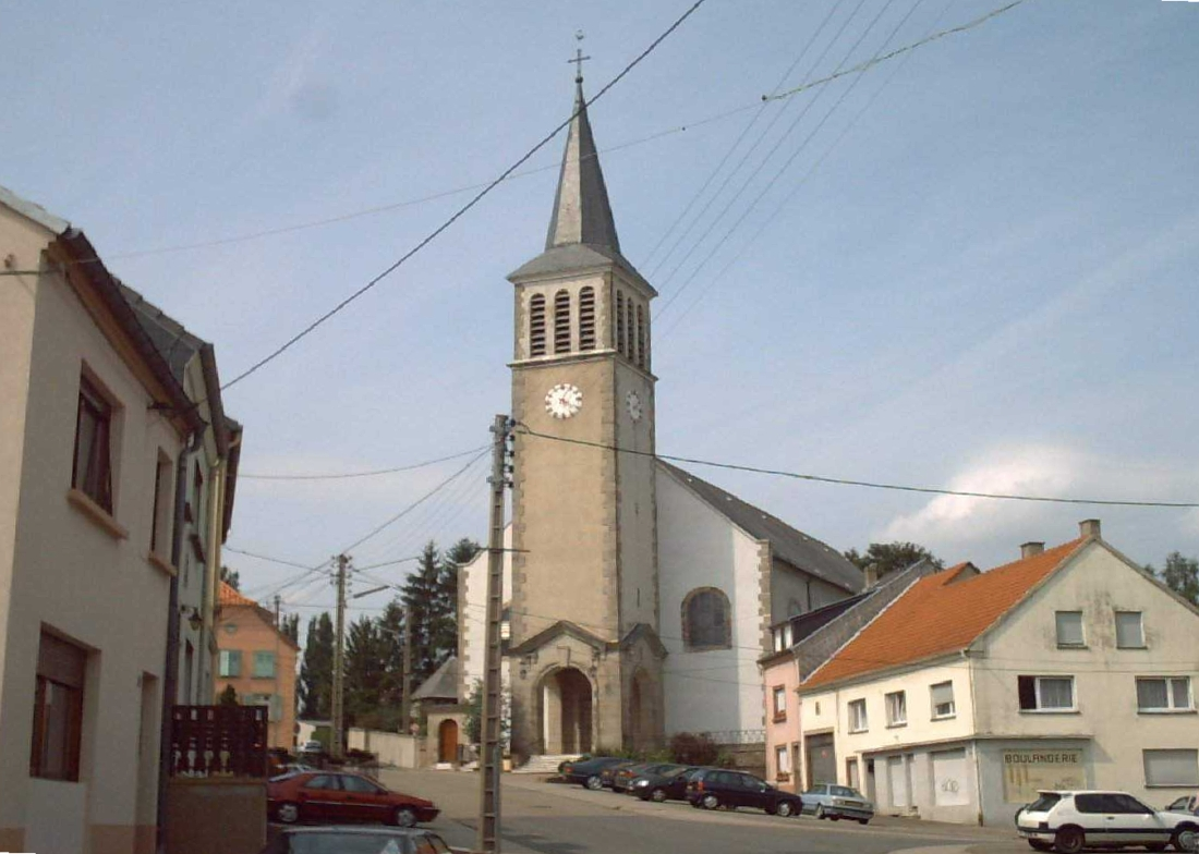 Grosbliederstroff (Moselle), Kirche